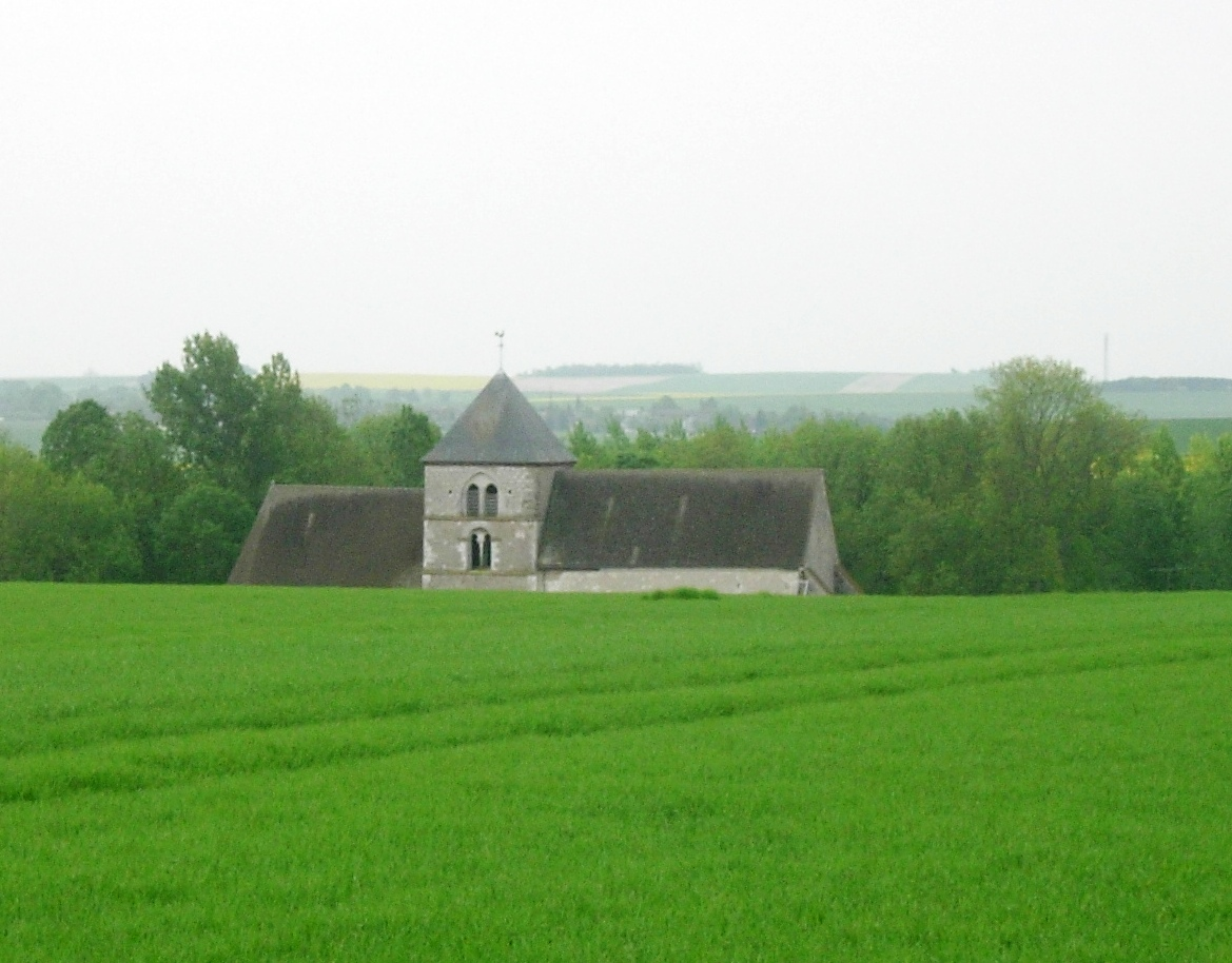 Saint Lupien (Aube / France)